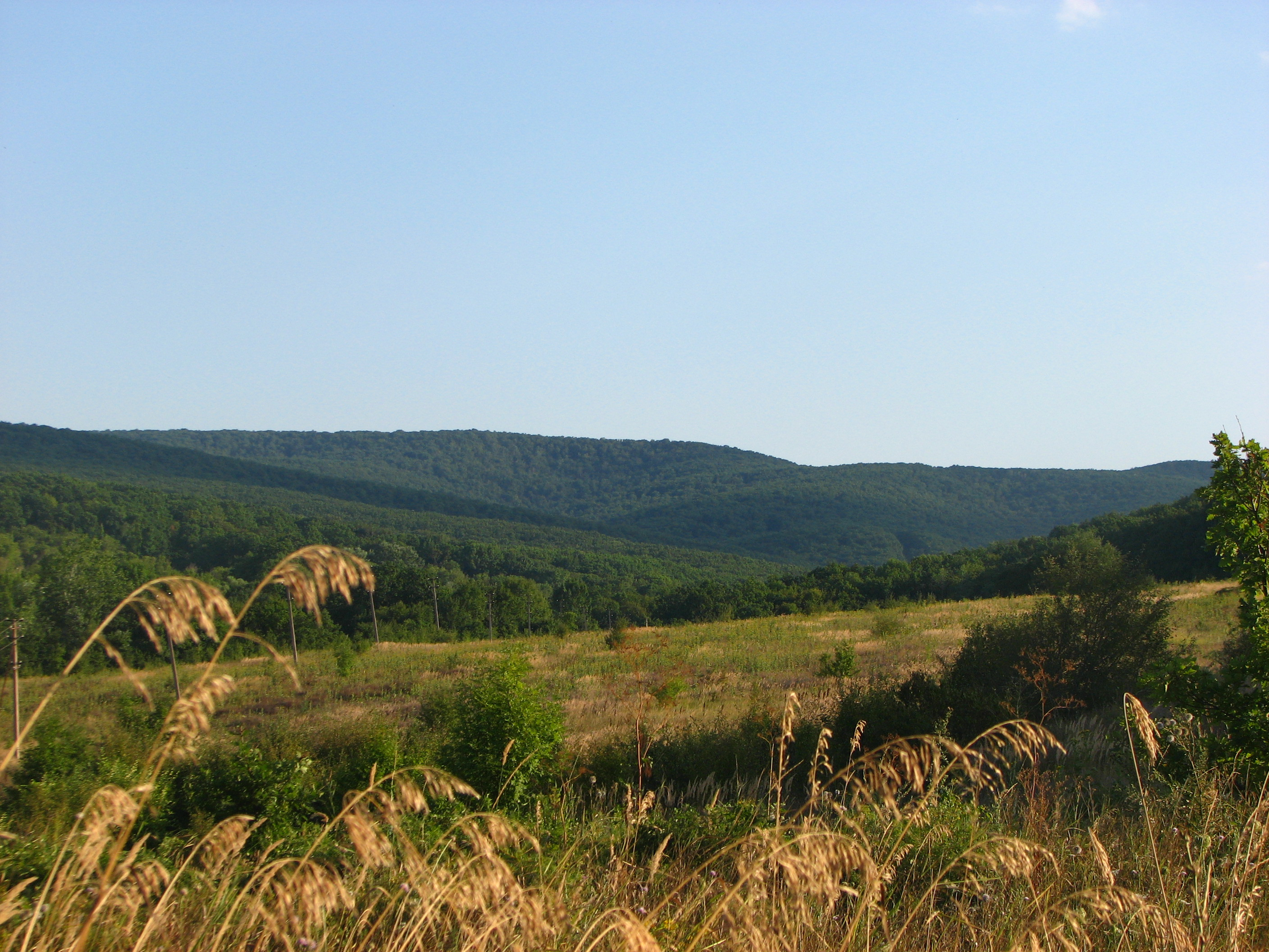 Вид на горы в окрестностях пос. Черноморского